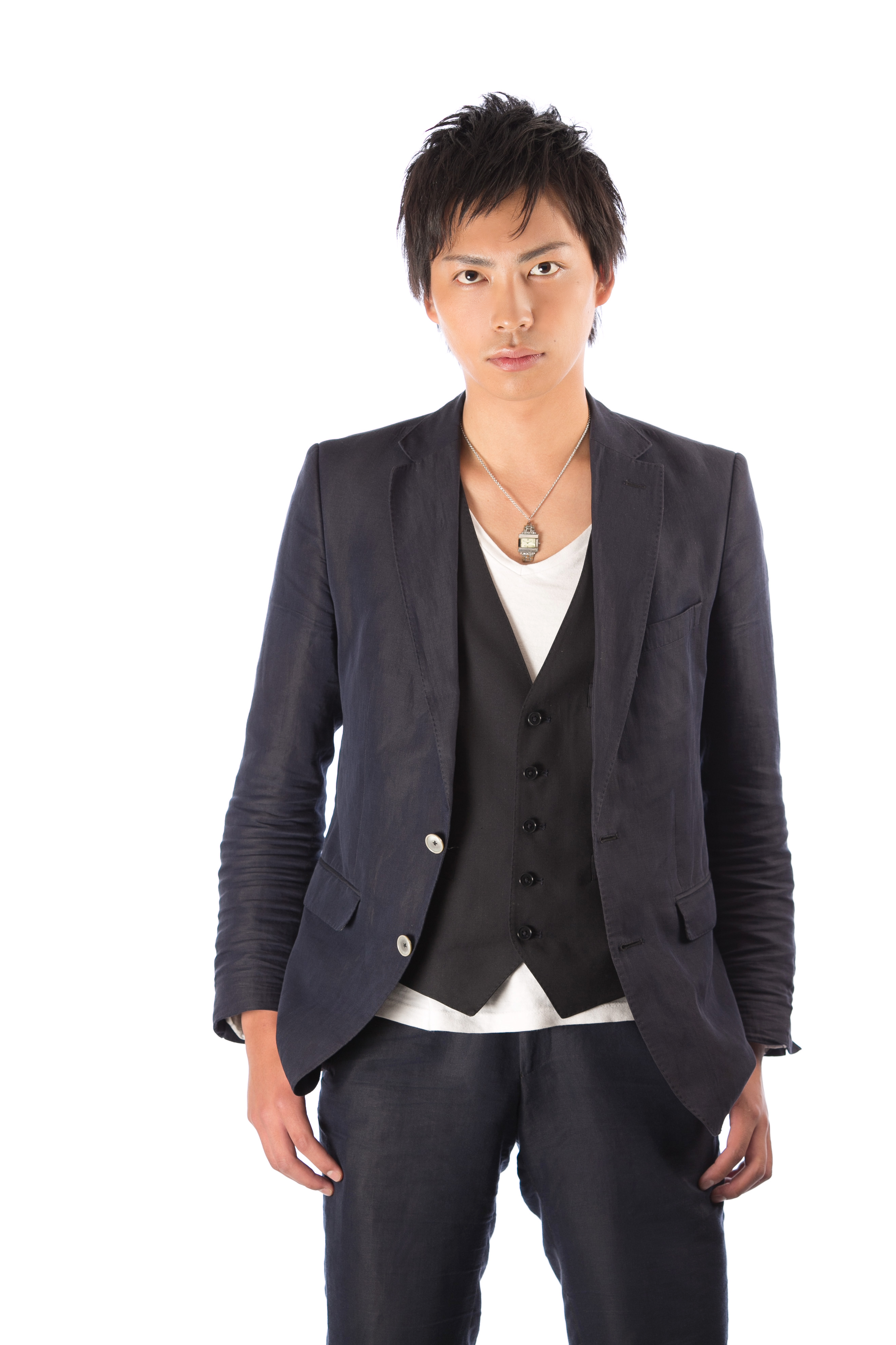 日本のモデル